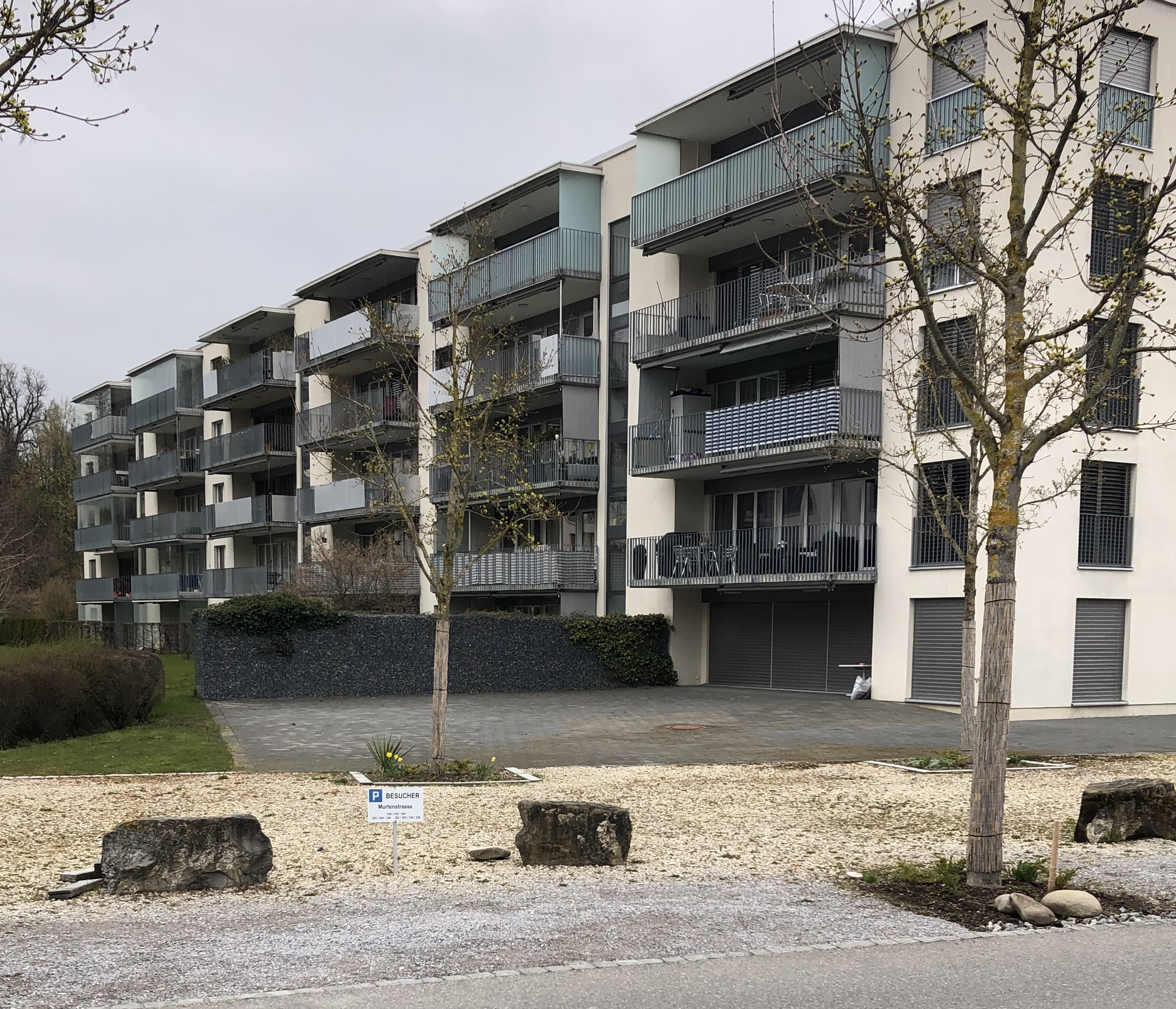 Ackerli Wohnbebauung